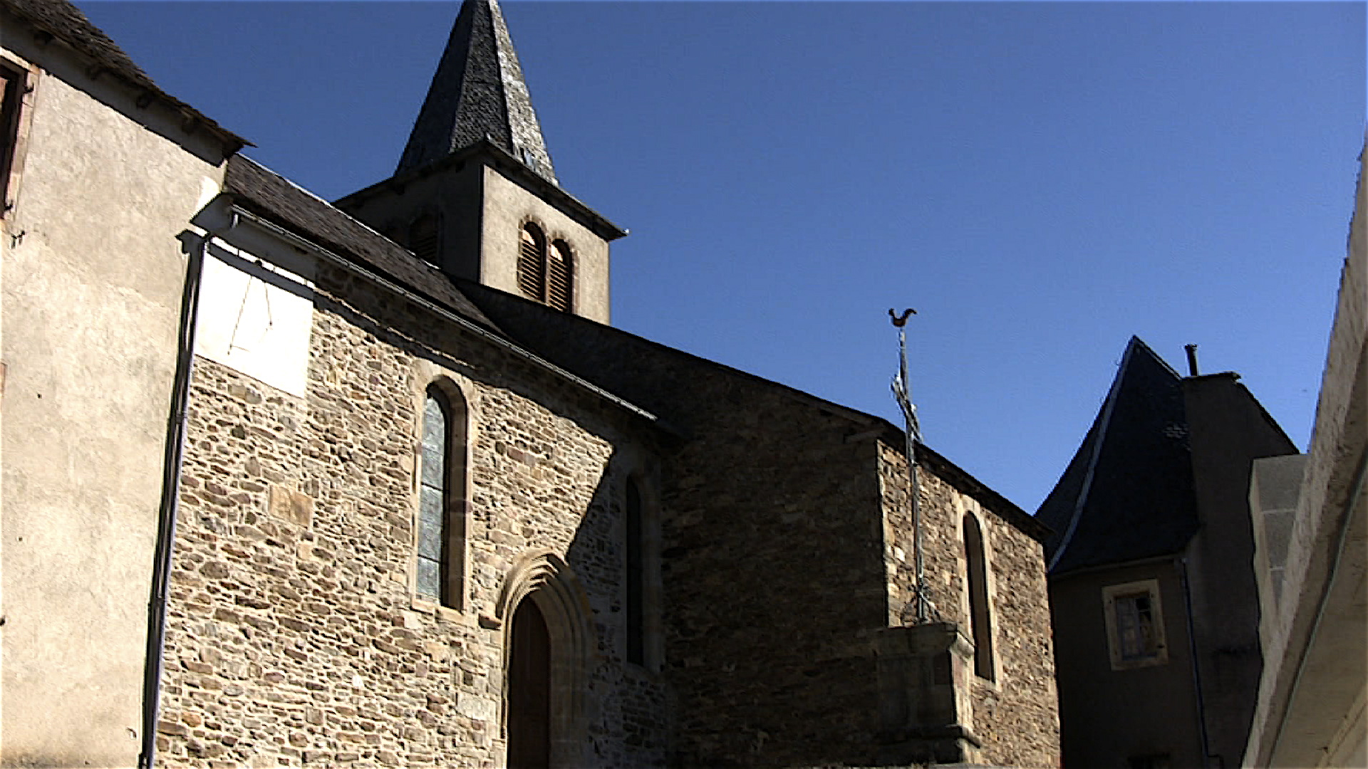 Eglise Saint-Jean-Baptiste, Pomayrols Aveyron France. (origine 11ème siècle). Reconstruite au 15ème, Restaurée aux 16ème, 19ème et 20ème siècles.